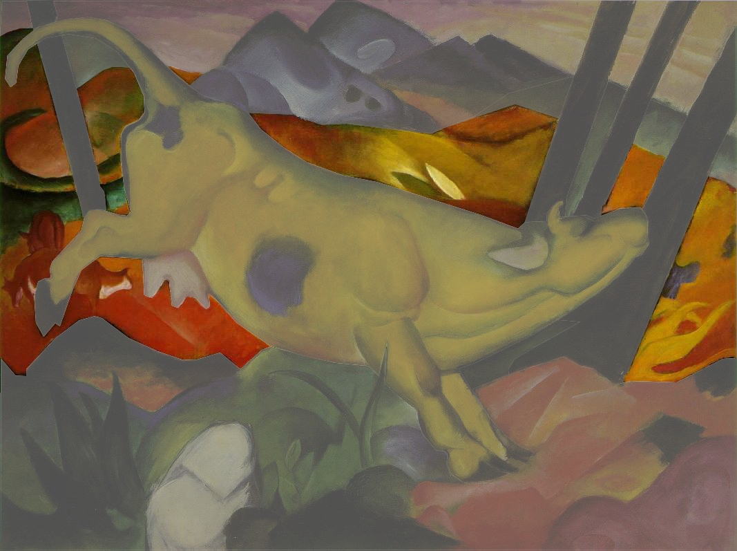 Bearbeitung von Datei:Franz Mark-The Yellow Cow-1911.jpg, mittiger Hintergrund freigestellt